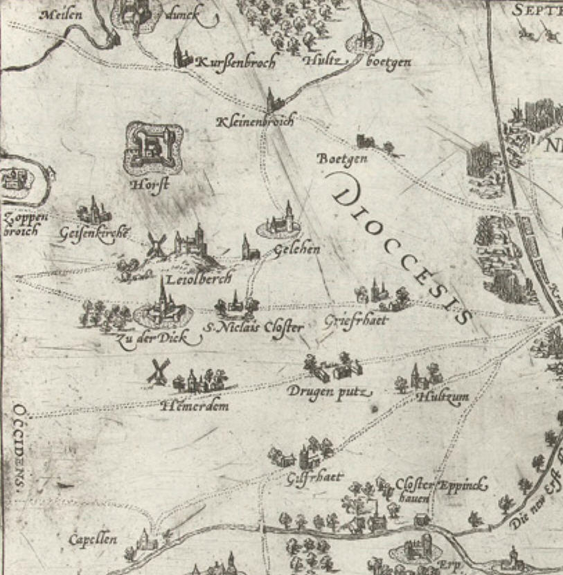 Kaart van Neuss en omgeving, 1585